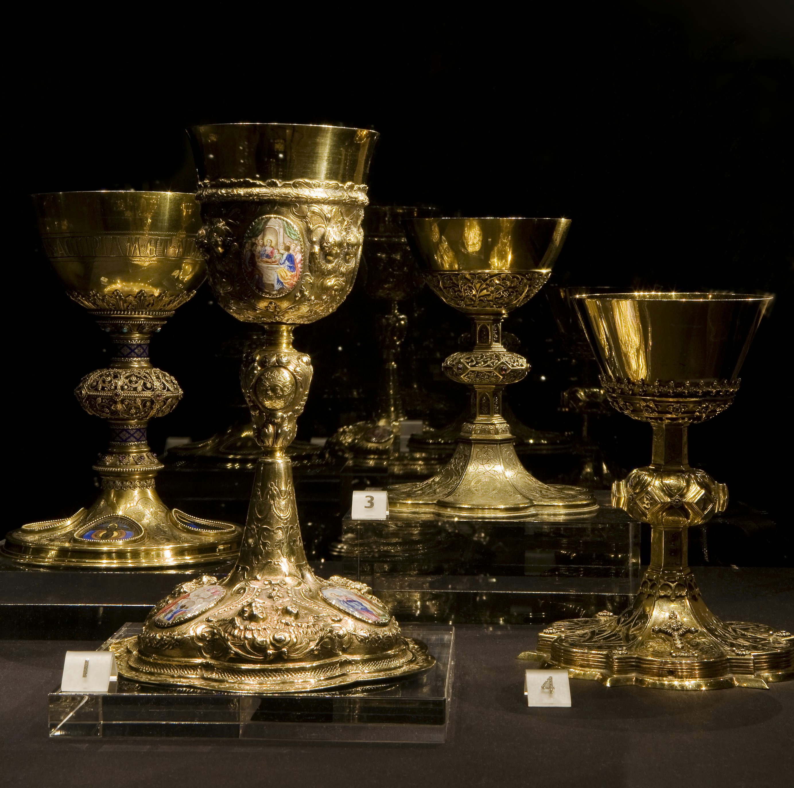 Sint Gerlachuskerk: Interieur, overzicht van diverse kelken (opmerking: Gefotografeerd voor publikatie voor het boek Heiligdom / Sanctuary Sint Gerlach.)